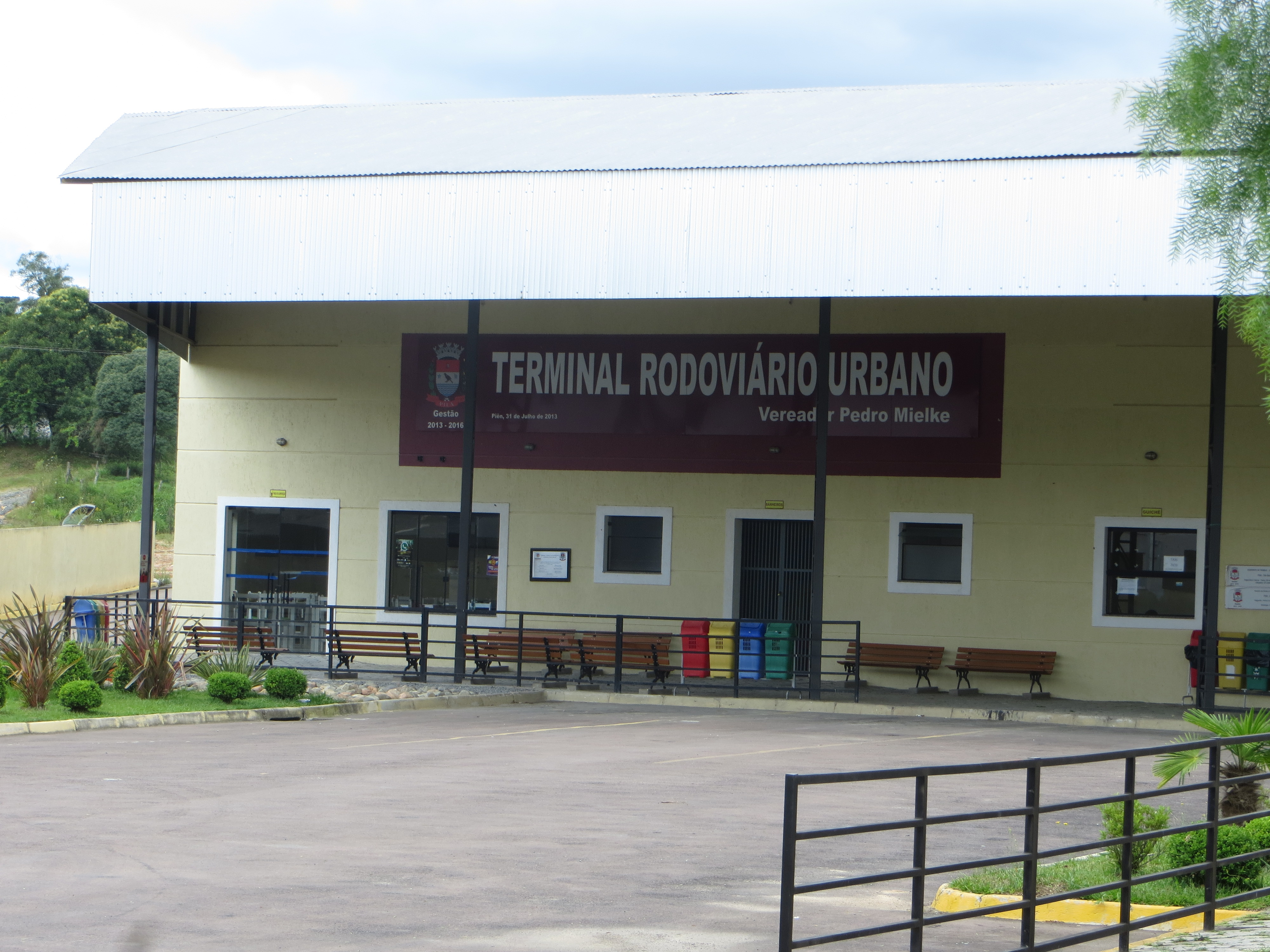 Terminal Rodoviário Vereador Pedro Mielke em Piên, Estado do Paraná, Região Sul do Brasil.